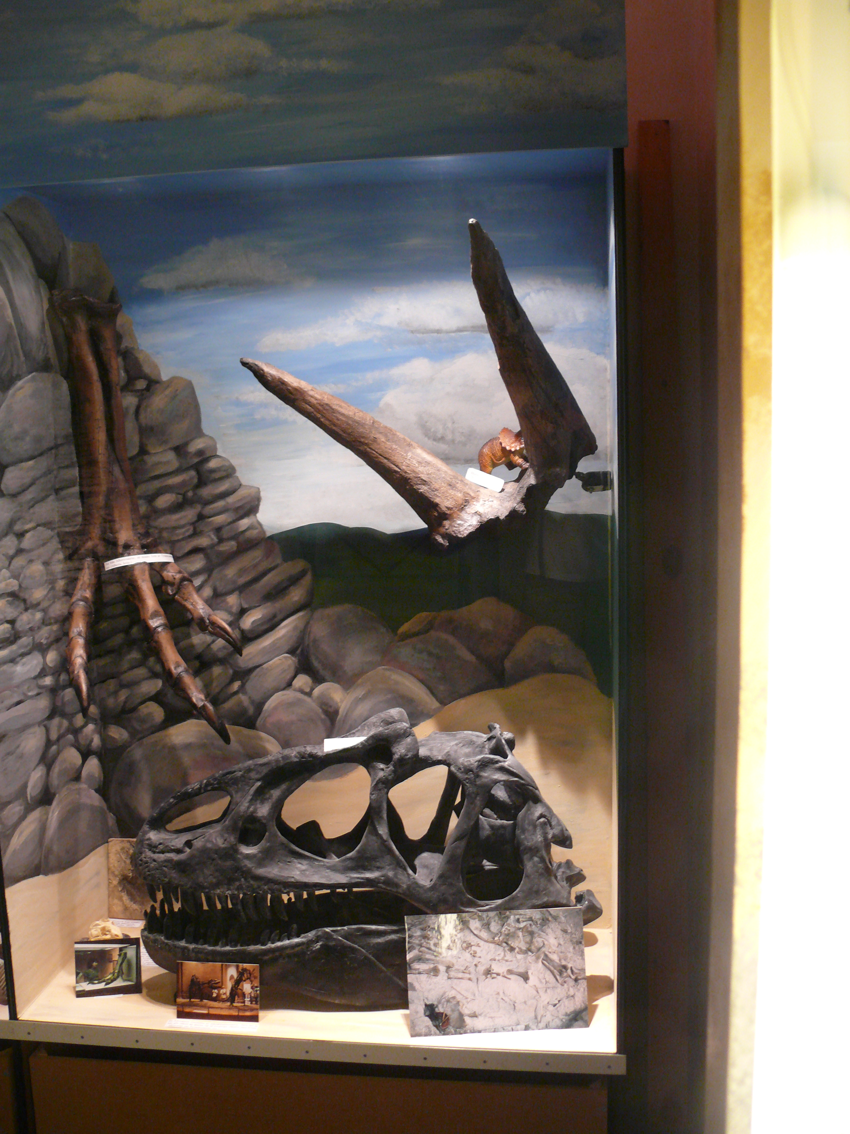 Allosaurus skull, Albertosaurus foot, Triceratops horns.